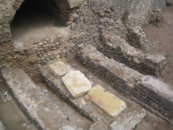 Restos del anfiteatro romano de Cartagena bajo la actual plaza de toros.